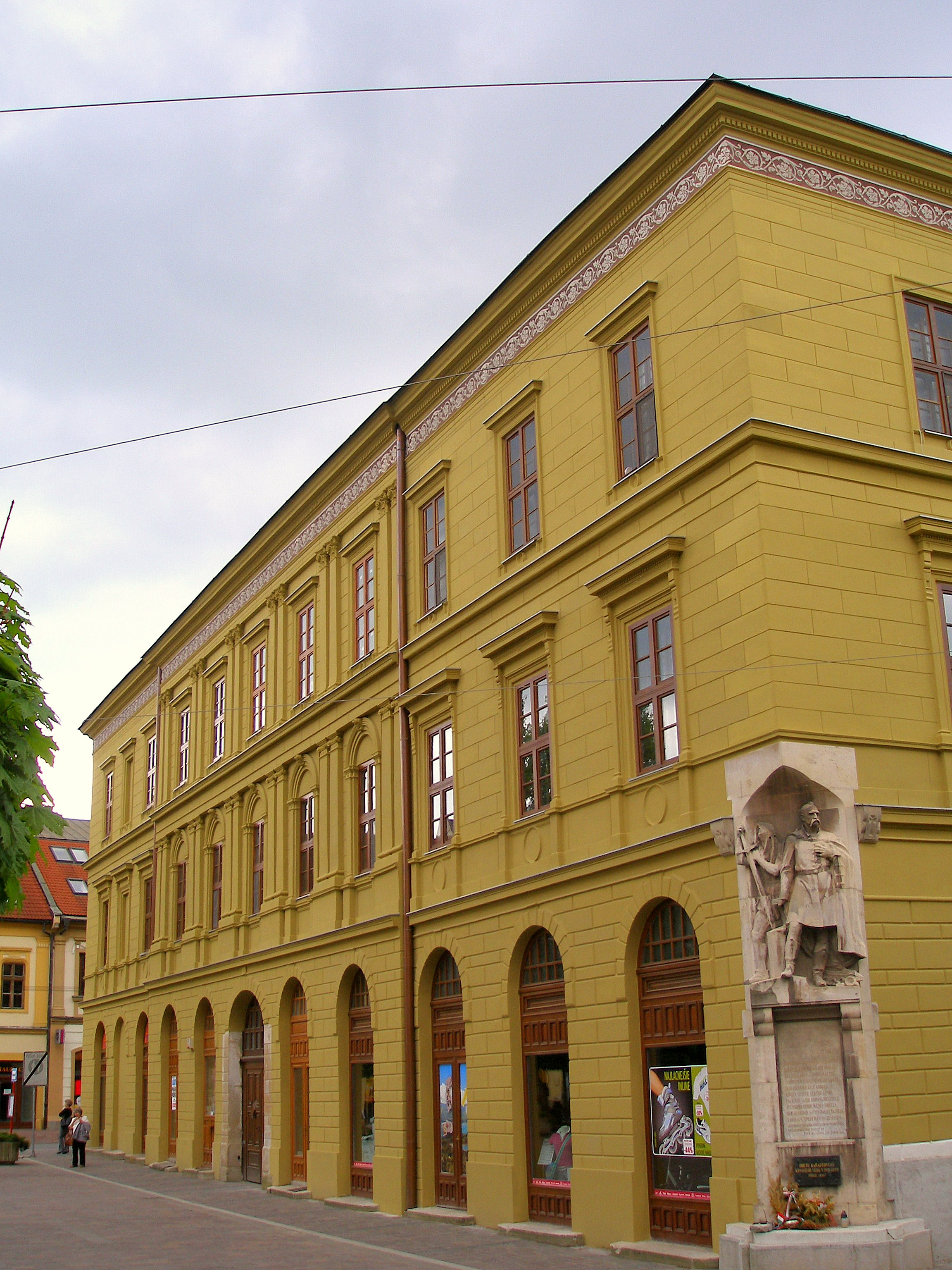 Historické centrum mesta Prešov.Renovovaná budova Kolégia.